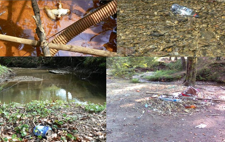 Onesnaževanje Črnušnice.